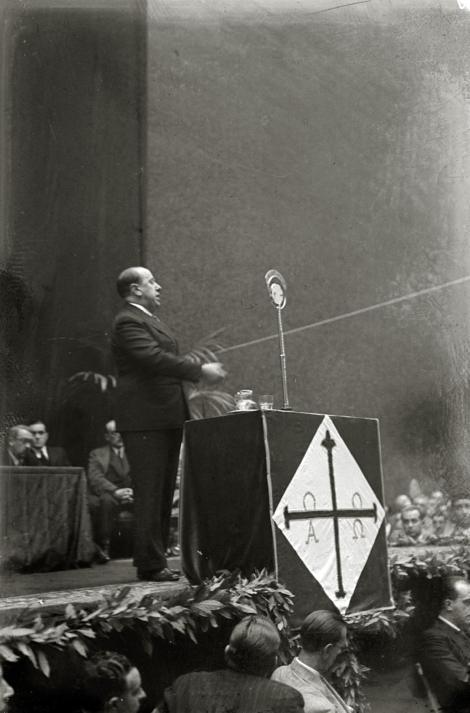 Título original: Mitin de José María Gil Robles, lider de la CEDA (Confederación Española de Derechas Autónomas), en las instalaciones de un frontón (7/7) Localización: San Sebastián (Guipúzcoa)